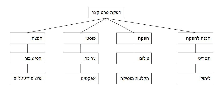 WBS במבנה עץ